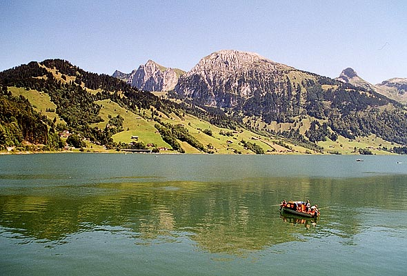 Wägitalersee mit Blick nach Innerthal